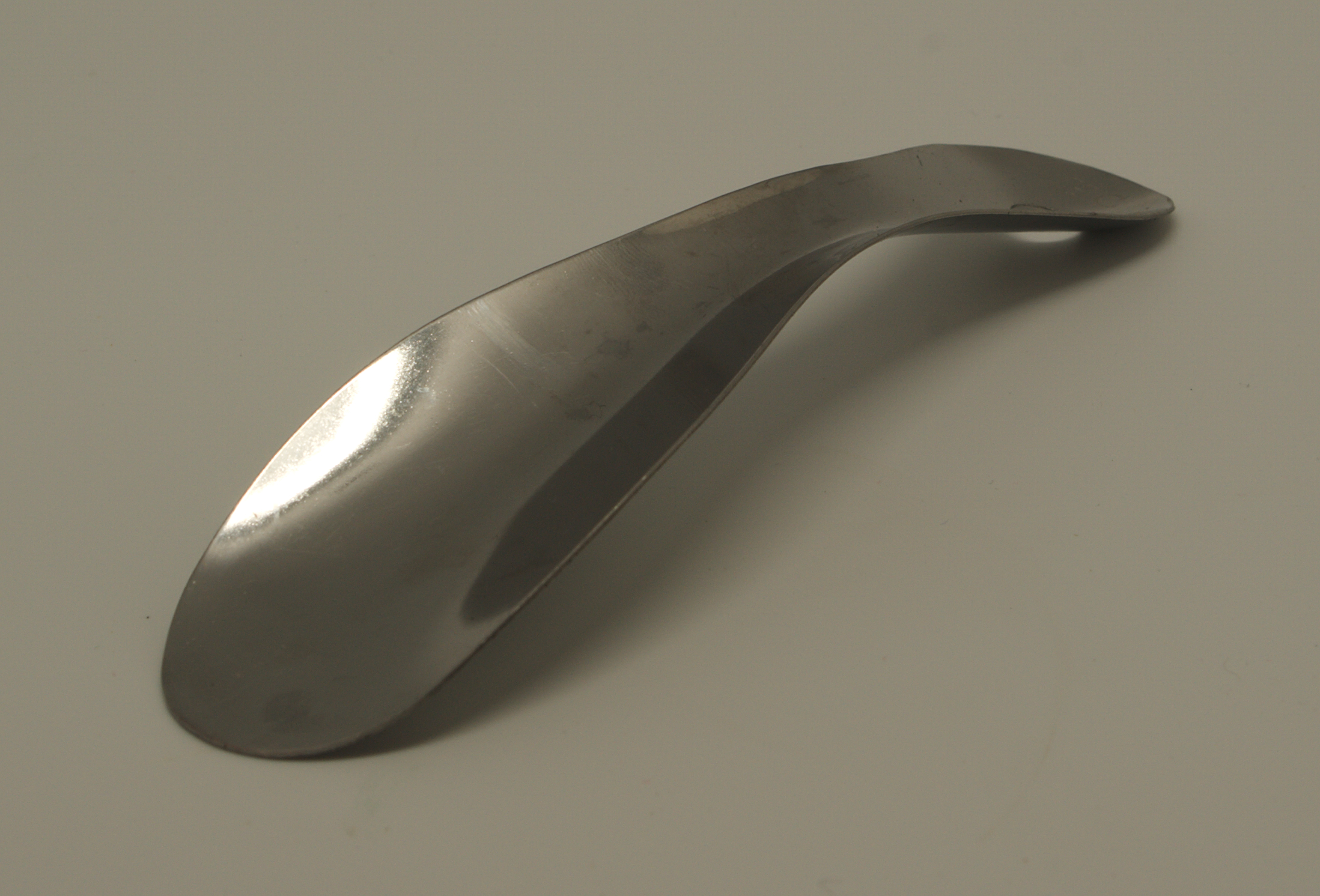 Chausse-pied en m�tal